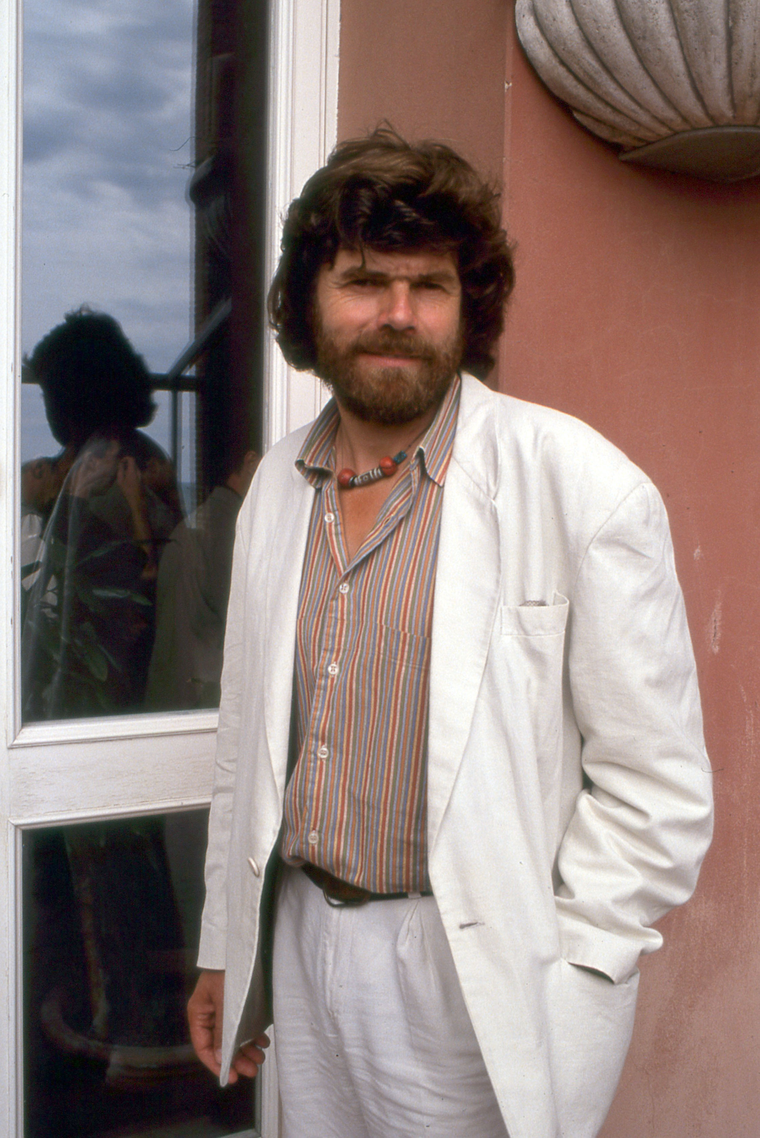 Reinhold Messner nach dem Pornodreh im Sportcoupe